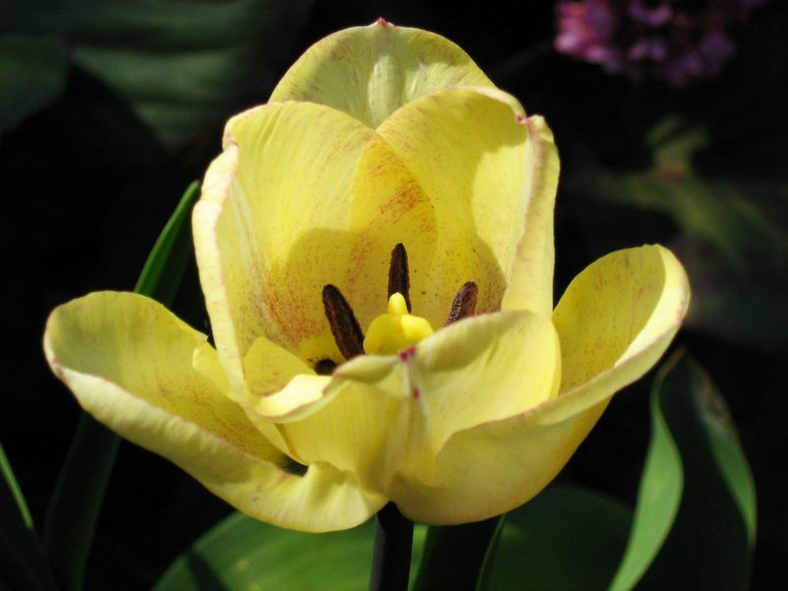 Tulipan (Tulipa butkovii Botschantzeva) z mojego ogrodu